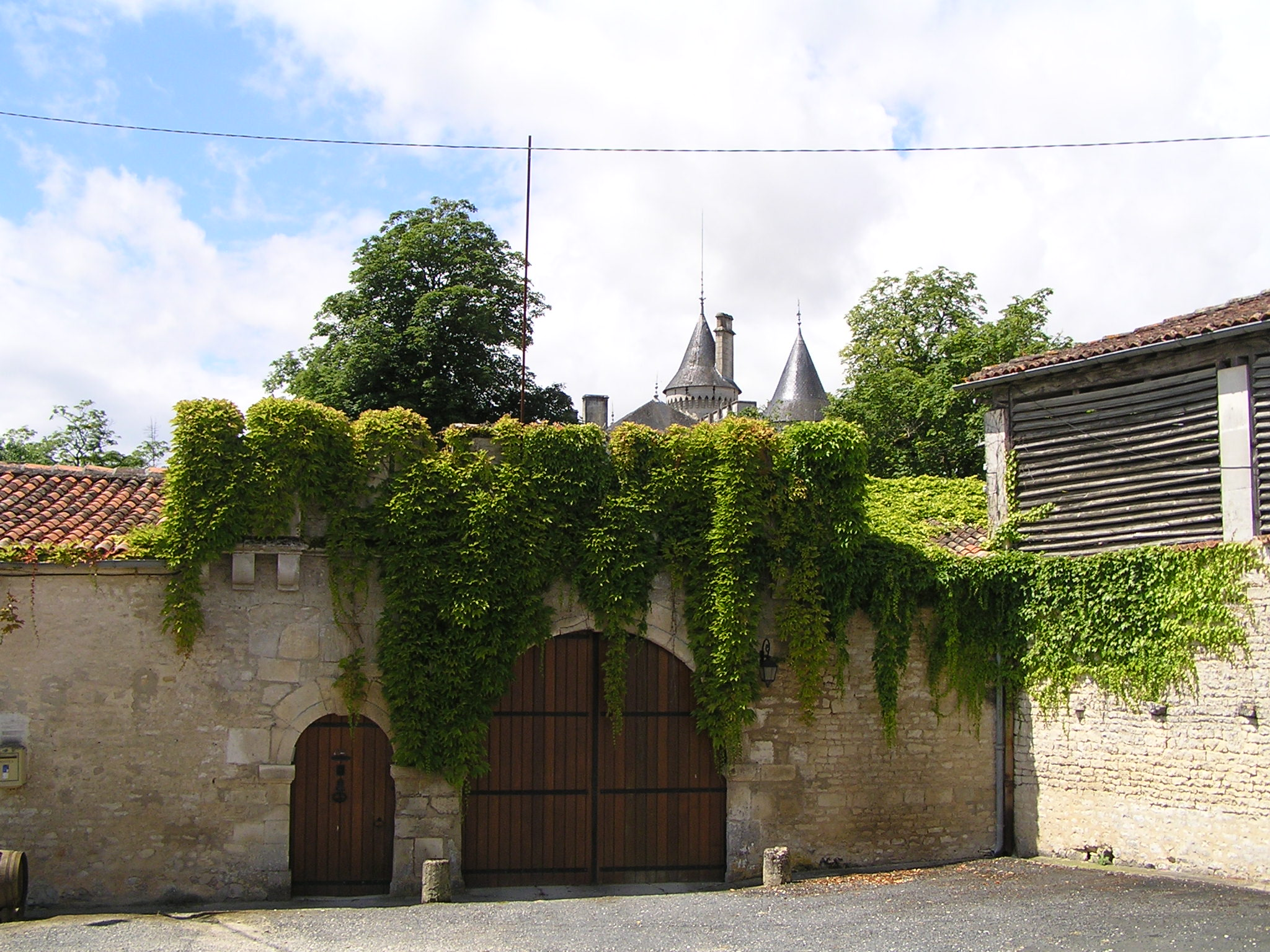 entrée du château de Fleurac, Charente, France